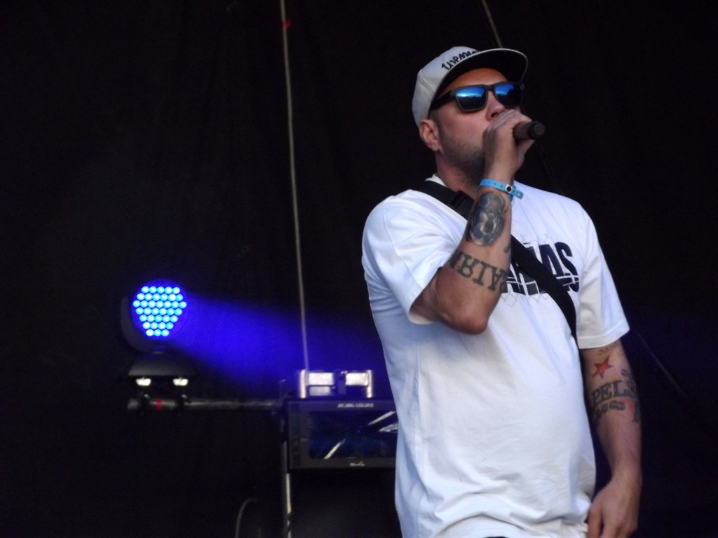 Zdjęcie zrobione podczas OFF Festival 2013 w katowickiej Dolinie Trzech Stawów.